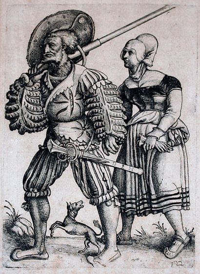 Eisenradierung (Blattgröße ca. 19 : 24 cm). Bartsch 63; Hollstein 71/II (von III). Kräfiger Druck mit der Funck-Nummer rechts unten. Mit Plattenschmutz. Leicht fleckig und schwach gebräunt.